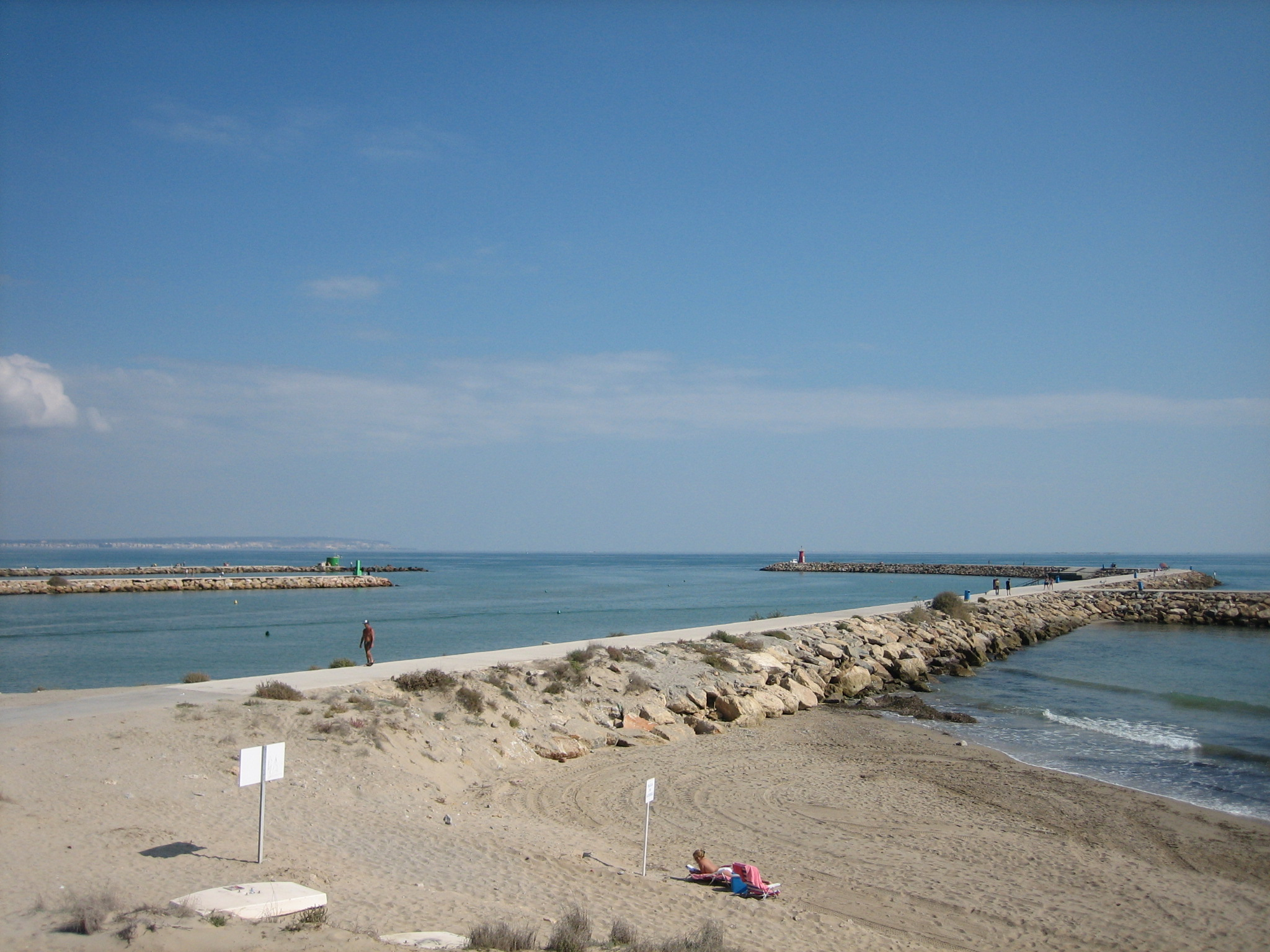 Desembocadura del río Segura en el mar Mediterráneo, en el término municipal Guardamar (Alicante, España). La desembocadura consiste en realidad en una entrada de agua de mar varios kilómetros al interior. Autor: Rodriguillo Fecha: 15/10/2006